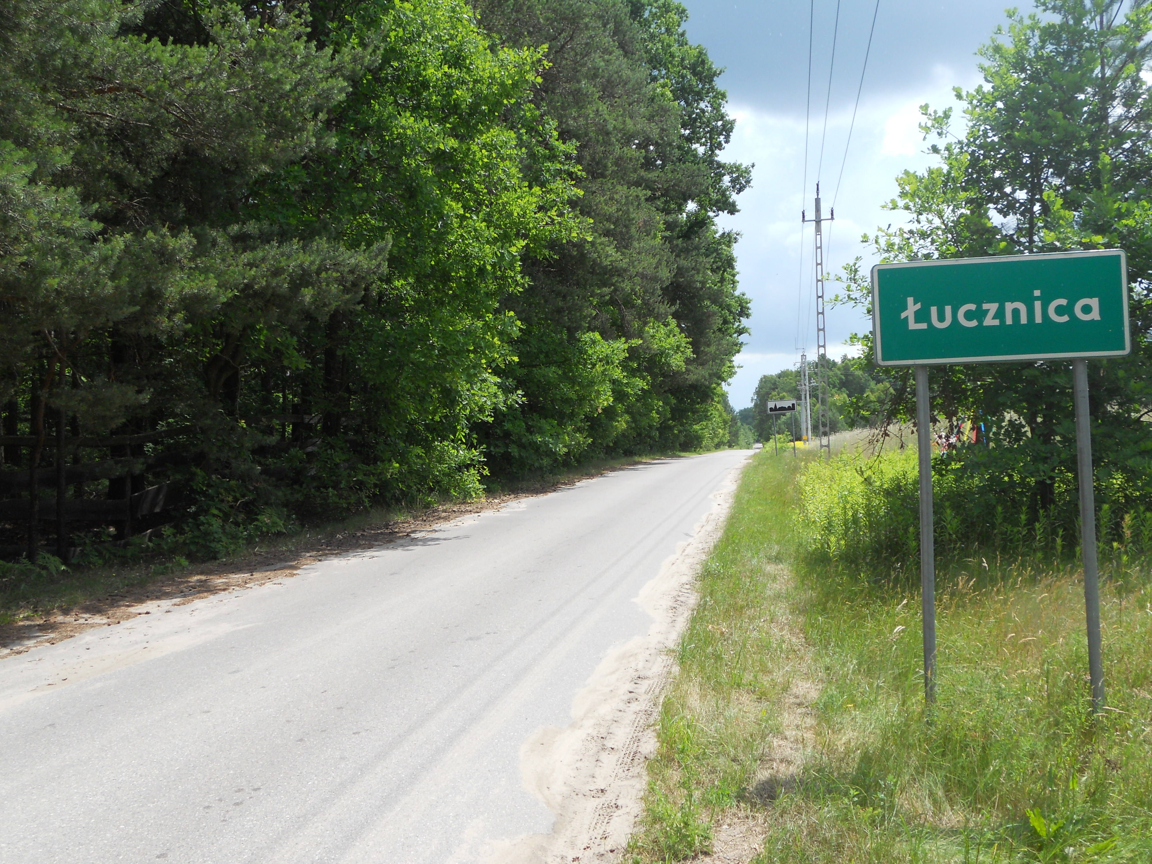 Miejscowość w gminie Pilawa